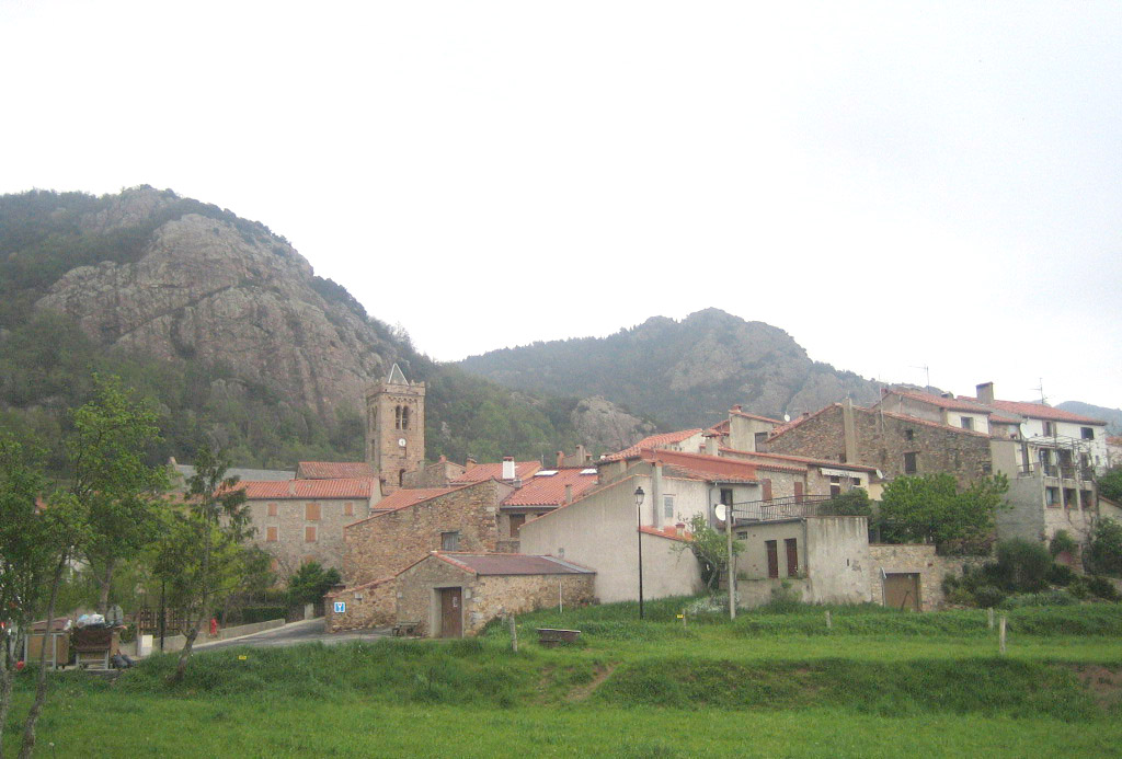 Coustouges-Custoja